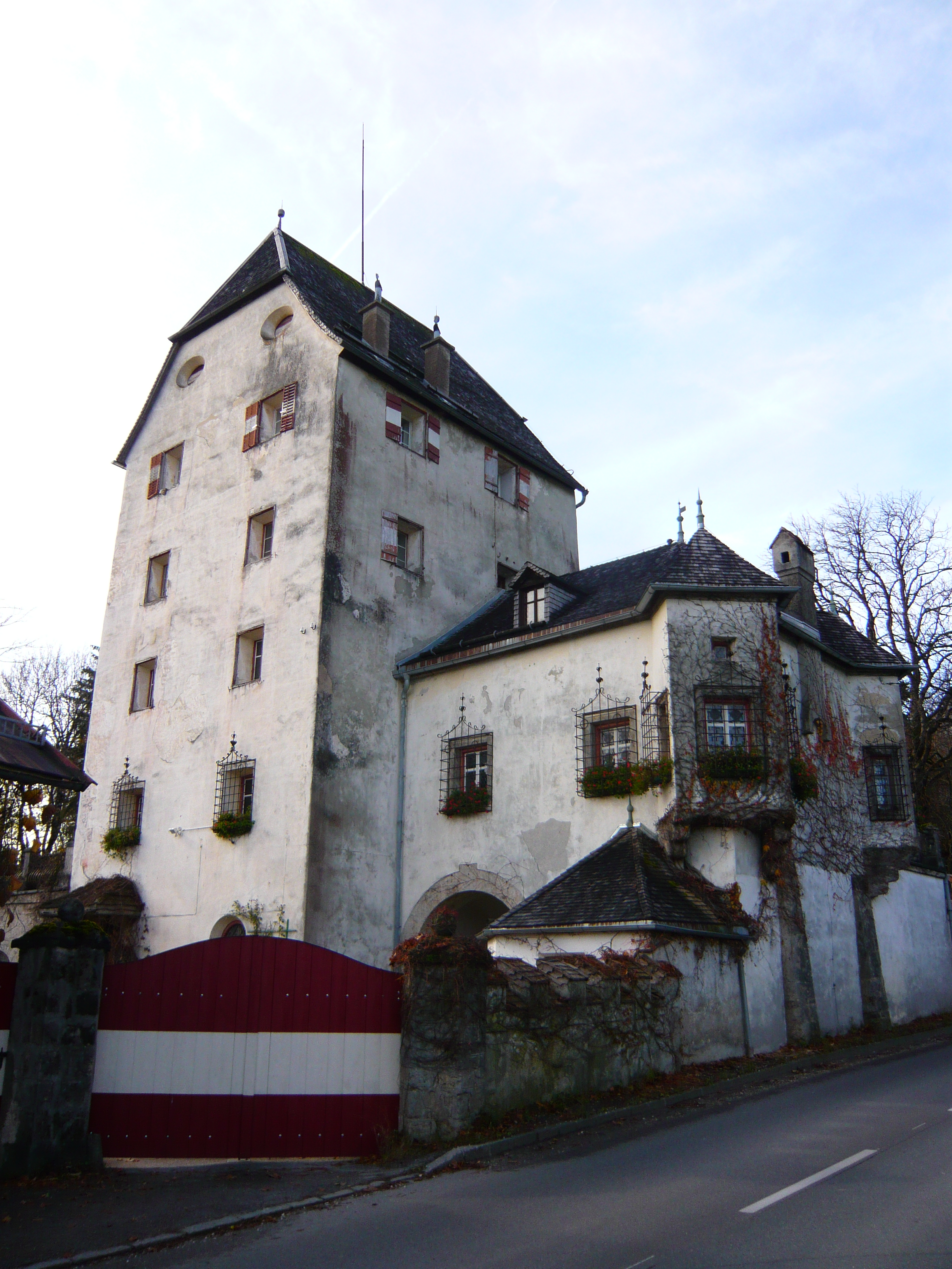 Schloss Schönwörth/Turm zu Niederbreitenbach - Schönwörthstraße 14, Langkampfen